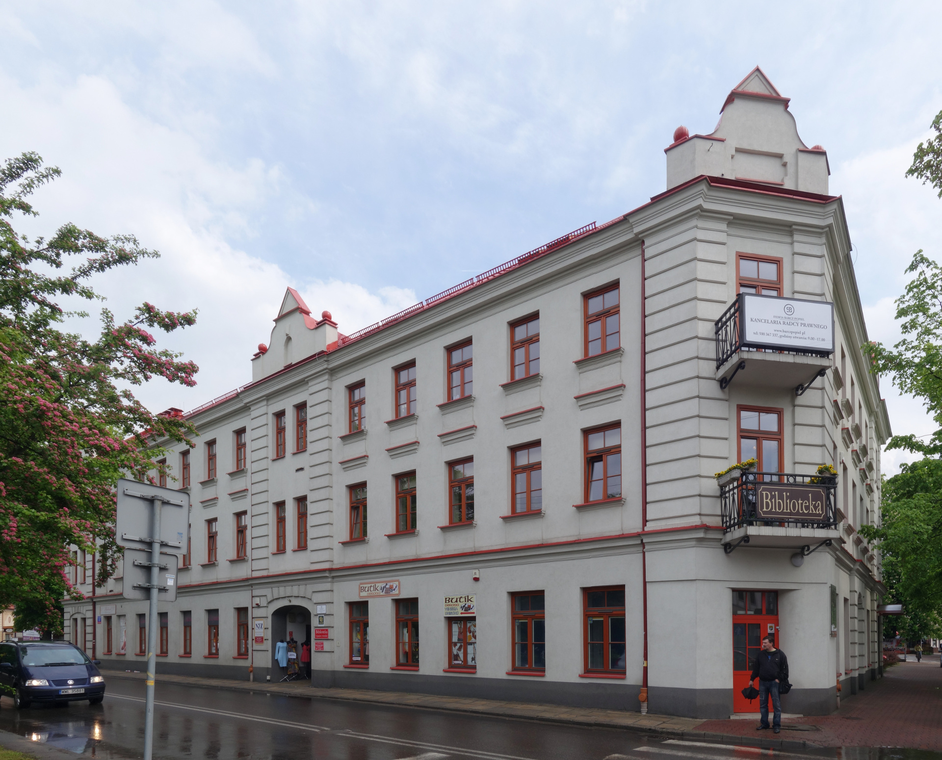 Widok na budynek mieszczący Miejską Bibliotekę Publiczną im. Zofii Nałkowskiej w Wołominie, ul. Wileńska 32. Dawniej budynek szkoły nr 1.